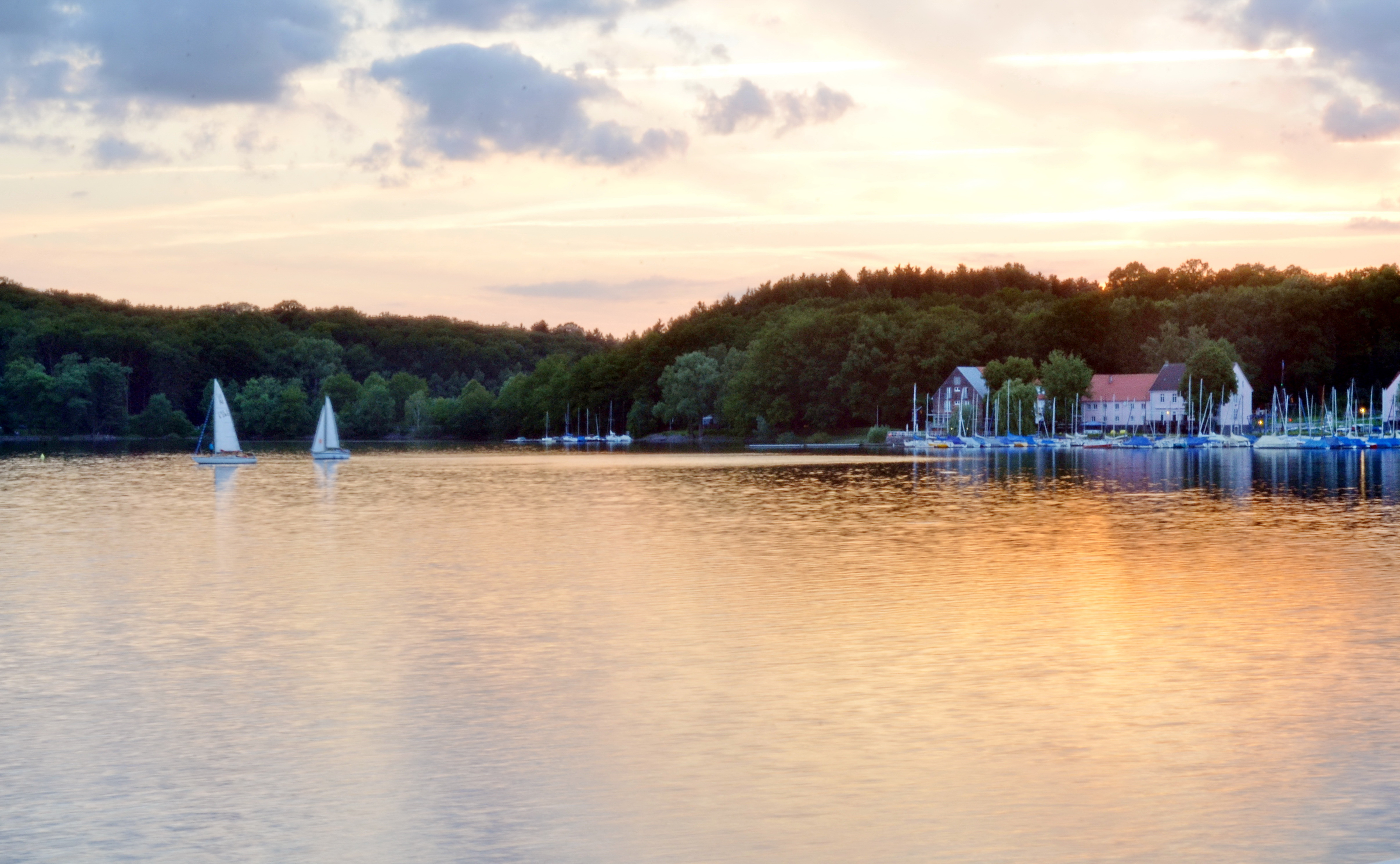 Dies ist ein Stausee, der Fluss heißt Möhne und liegt nahe bei der Stadt Soest.